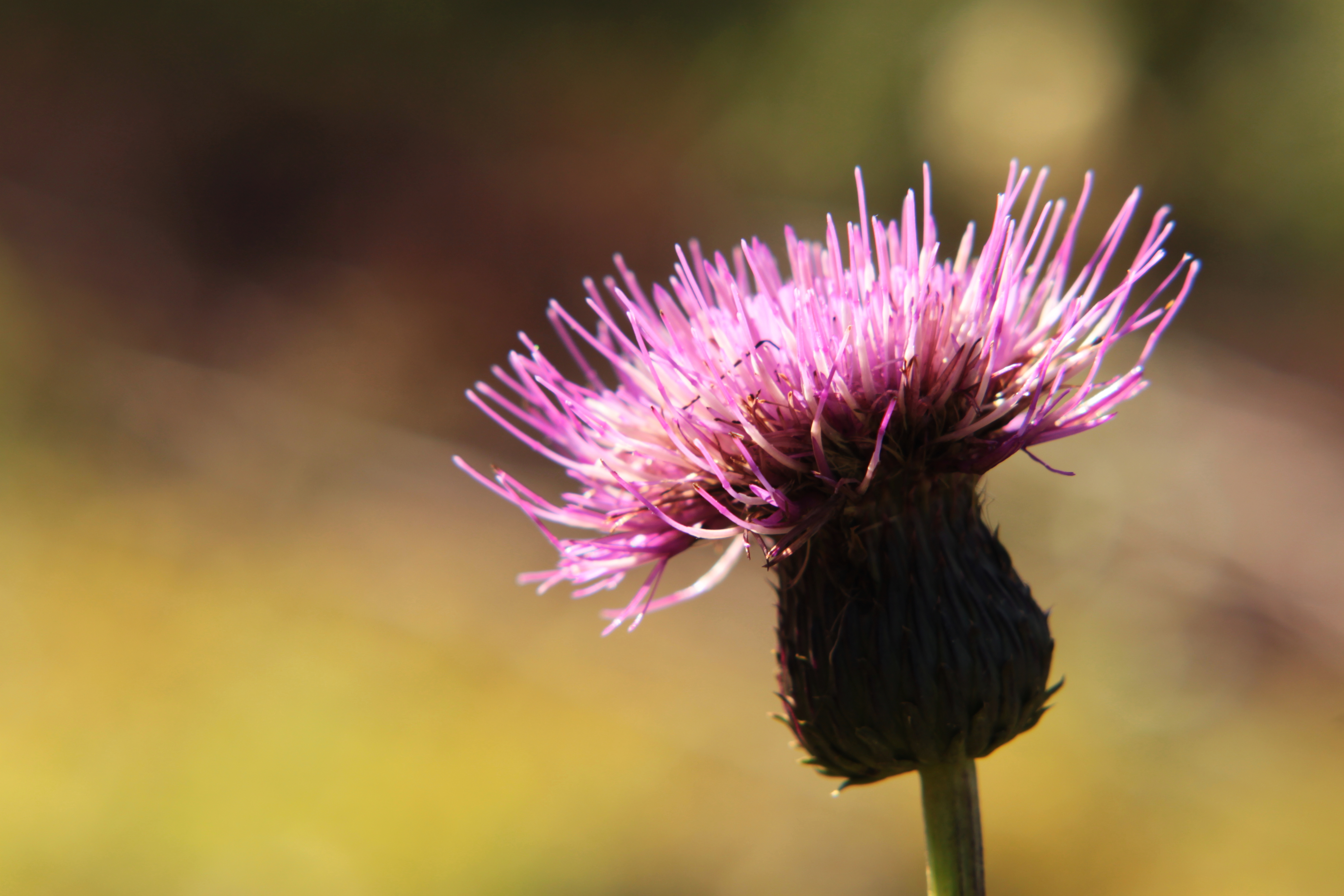 Bodlák (Carduus)